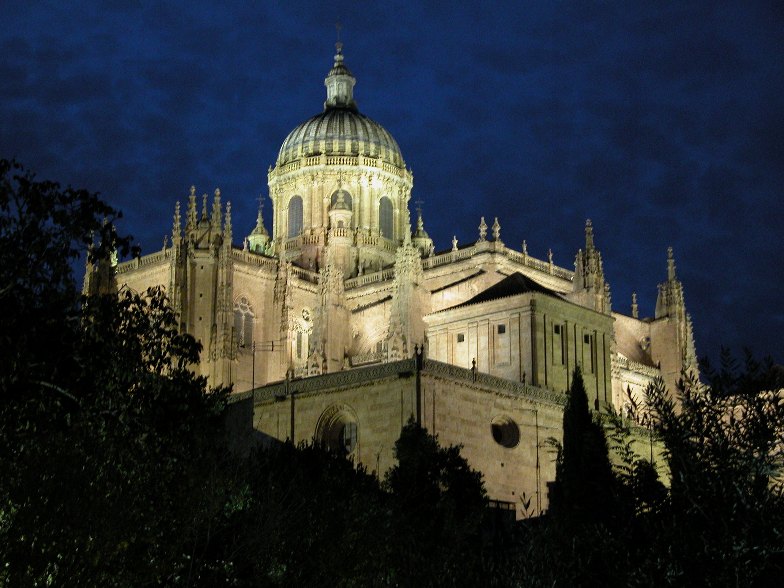 Fotografia de la catedral de Salamanca